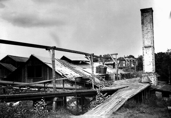 Brattfors, hammaren (nedlagd 1918) 1910-tal. Foto av Ölander.